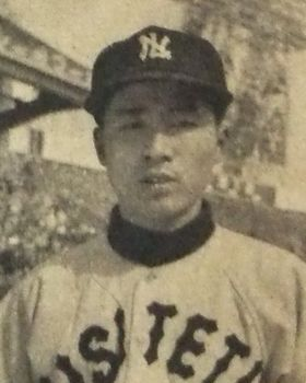 河村久文